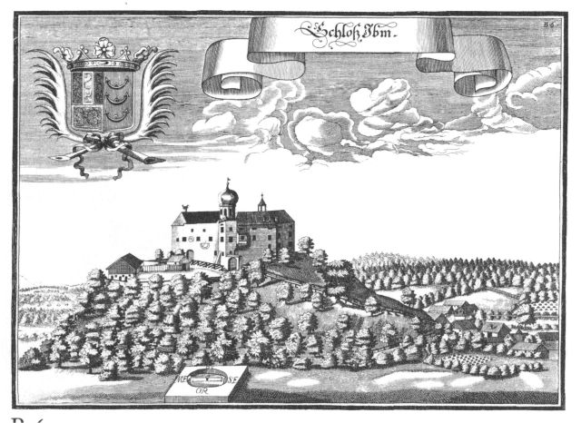 Schloss Ibm